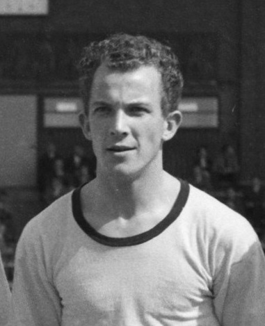 André Orval in 1961.